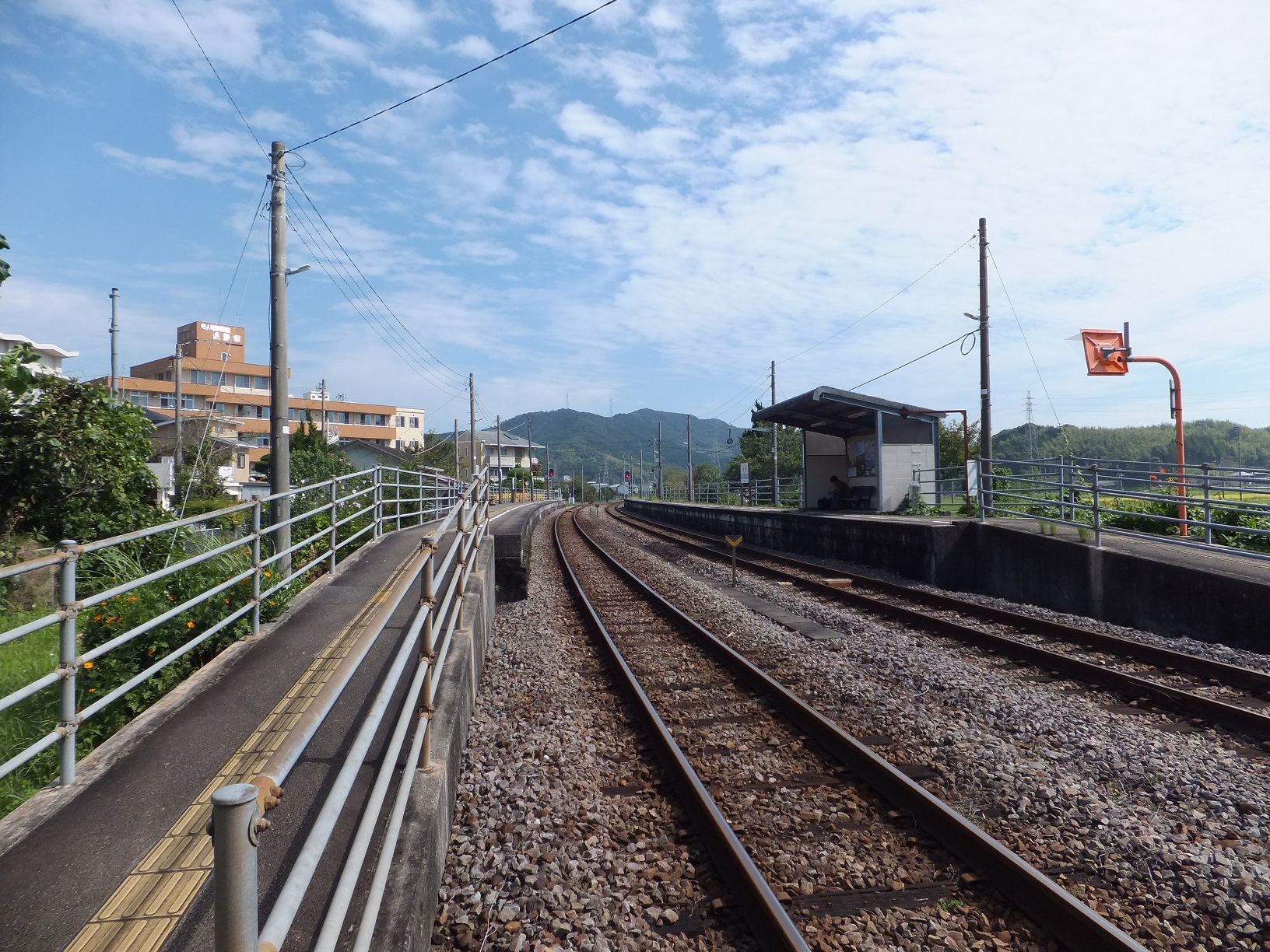 徳島県阿南市 JR牟岐線桑野駅 2015年9月 （ホーム 新野側より撮影）